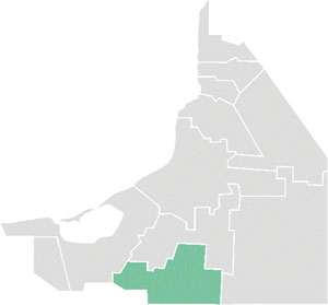 Mapa del municipio de Candelaria en el estado mexicano de Campeche